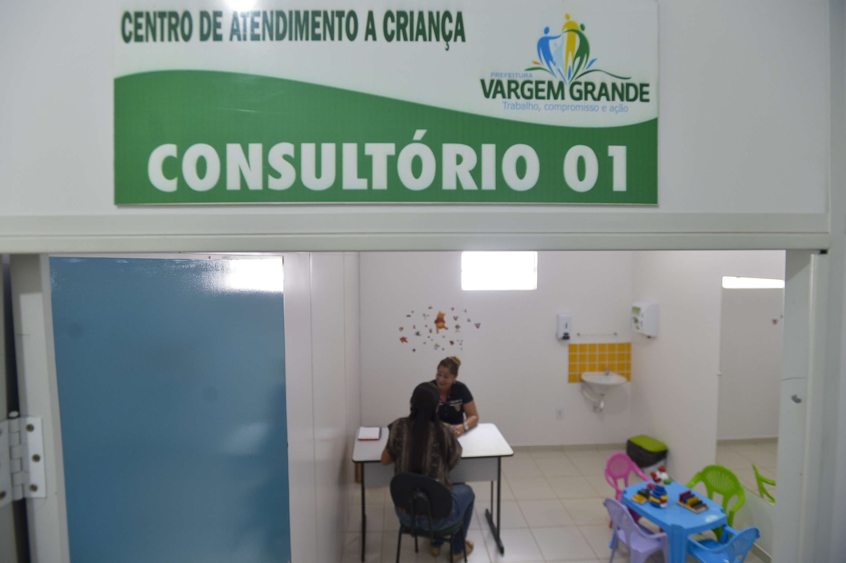 Vargem Grande (MA) - Município com cerca de 52 mil habitantes recebe profissionais cubanos para o Programa Mais Médicos. Na foto, a médica Josefa Rebeca Rodriguez, Foto: Marcello Casal Jr./ABr